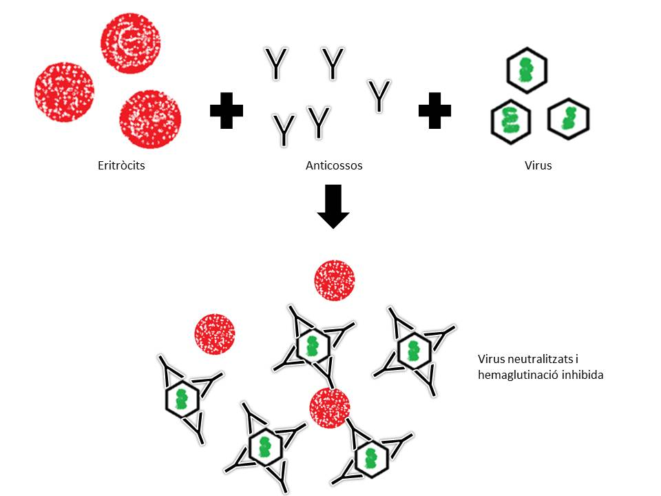 Es presenta l'actuació dels anticossos per tal d'evitar l'hemaglutinació que realitzen els virus envers els eritròcits.